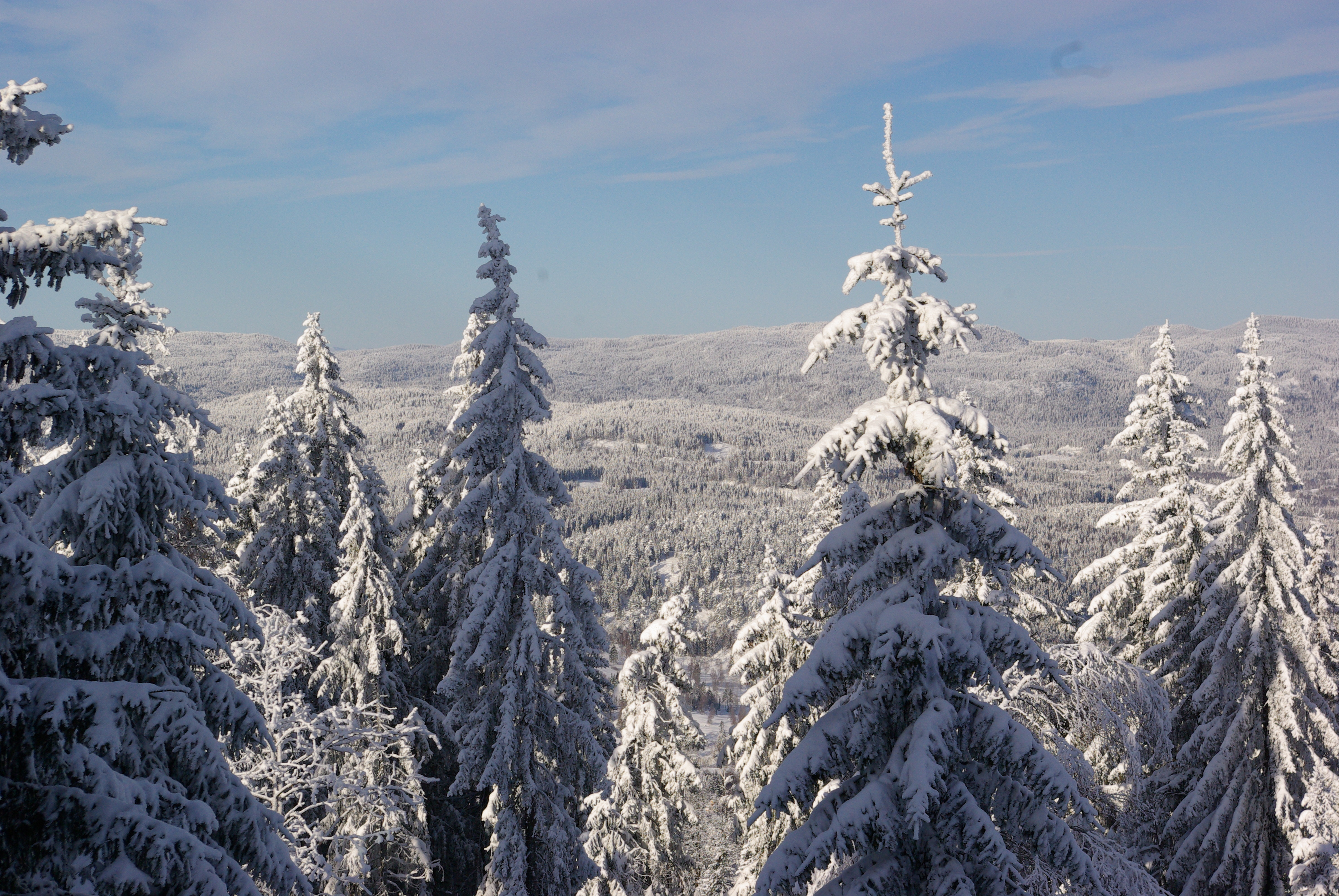 Utsikt frå Voksenkollen